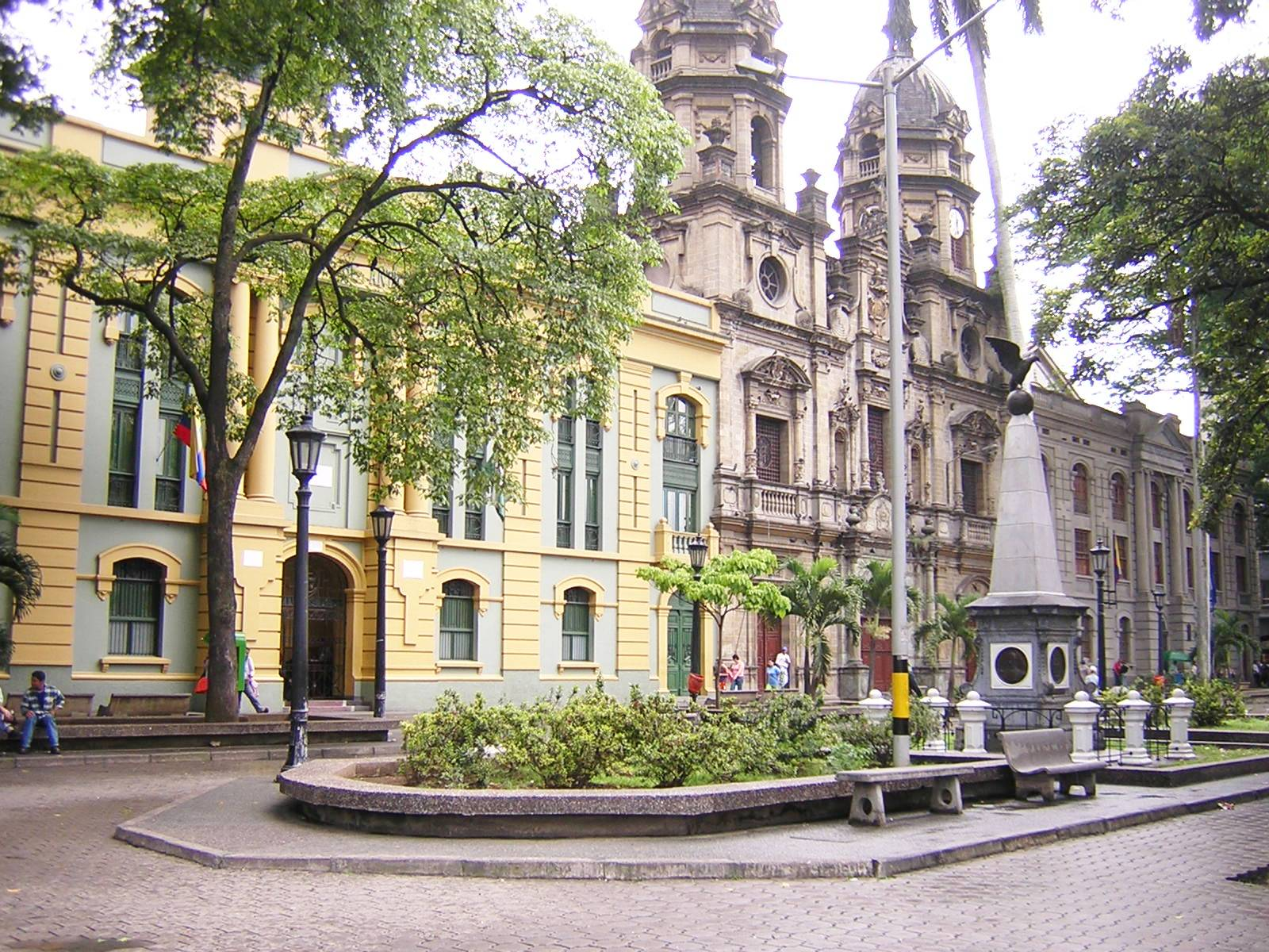 Plazuela San Ignacio en la actualidad. Paraninfo de la Universidad de Antioquia (izquierda) después de la gran reforma, de estilo Republicano o Neoclásico. En el medio Iglesia de San Ignacio de estilo barroco y en el otro costado queda actualmente la sede de una entidad colombiana. Medellín, Colombia.(SajoR: Yo el autor de esta foto, que yo mismo tomo, la libero al dominio público - I am the author of this photo that I took myself and release to the public domain)